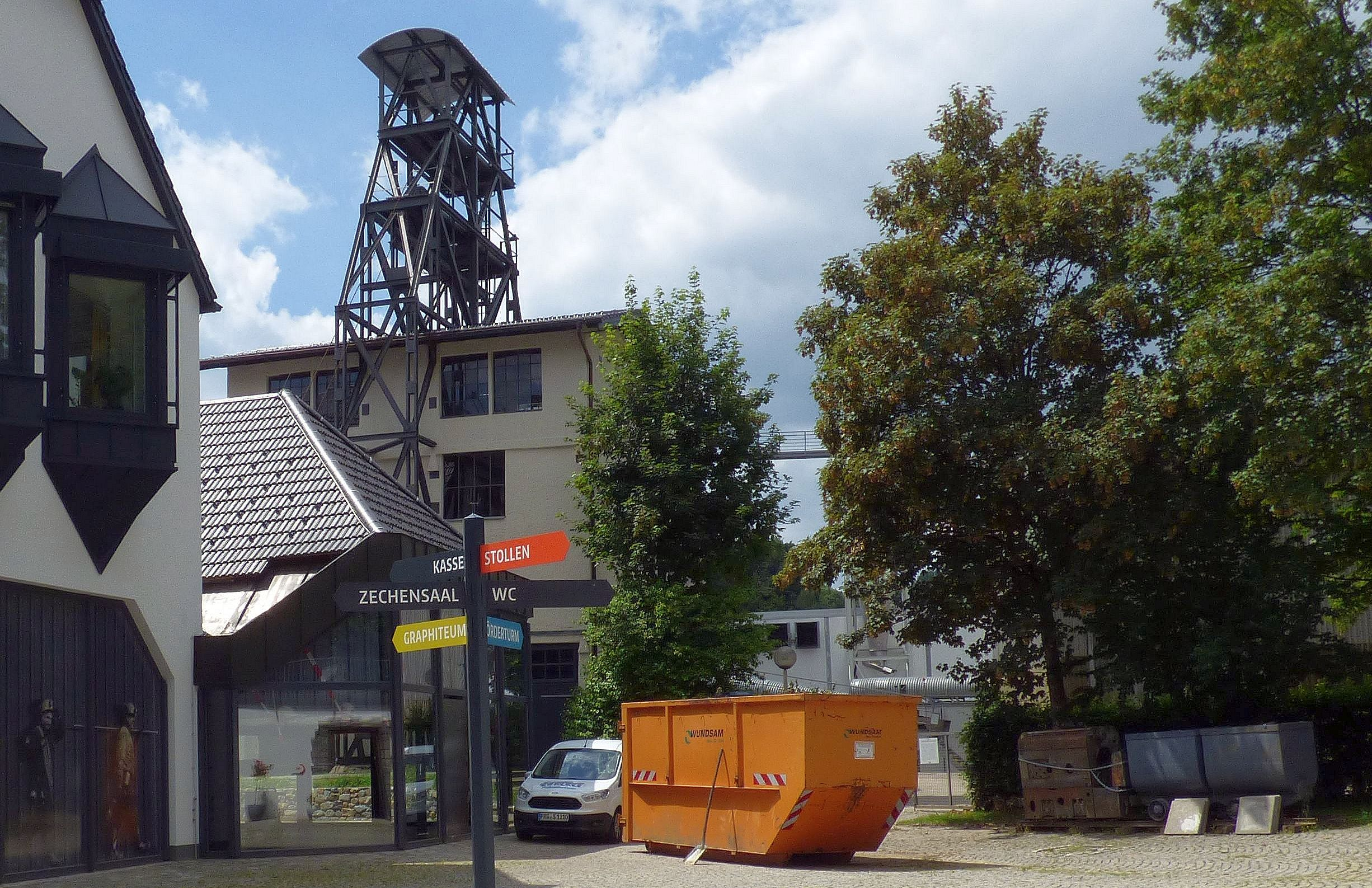 Graphit-Besucherbergwerk Kropfmühl